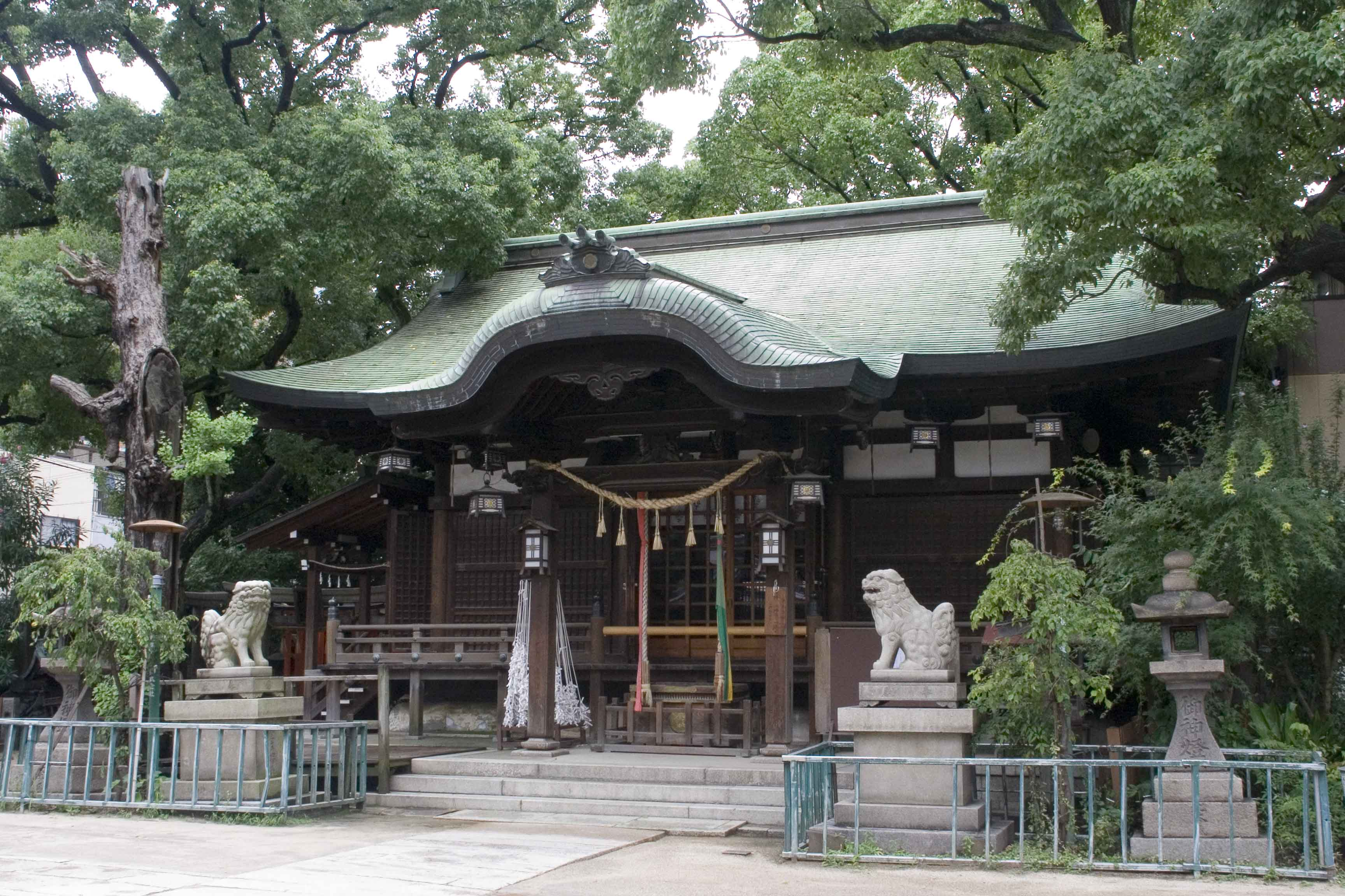 海老江八阪神社 拝殿